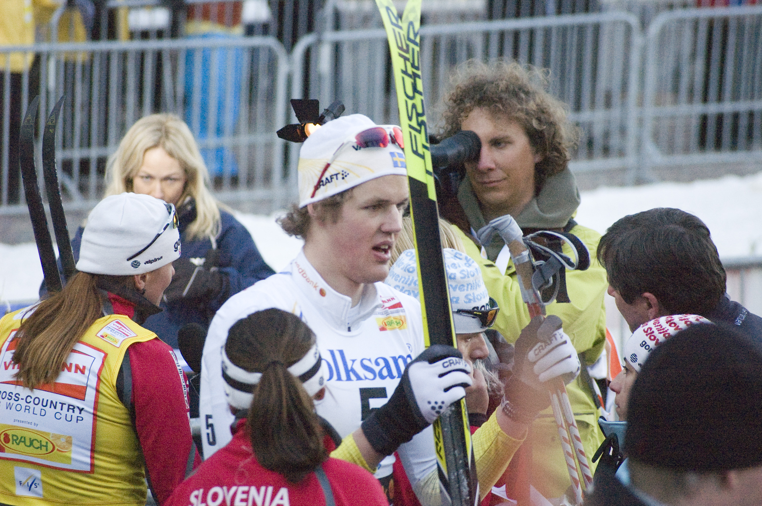 Foto: Daniel Lennartsson